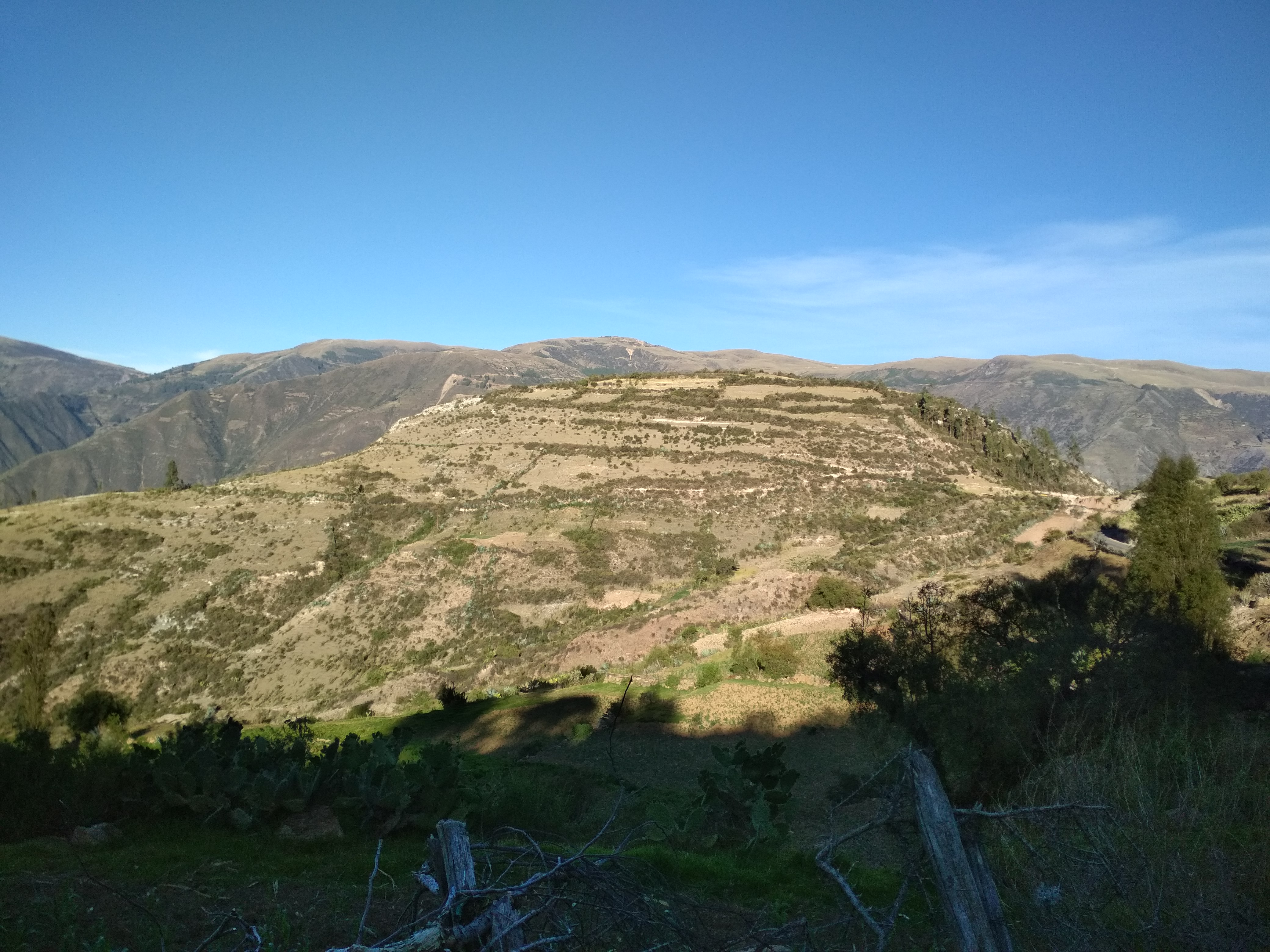 Tiquimarca es un lugar arqueológico ubicado en la Comunidad Campesina de Tiquihua, en el distrito de Hualla, Provincia de Víctor Fajardo en el Departamento de Ayacucho en Perú